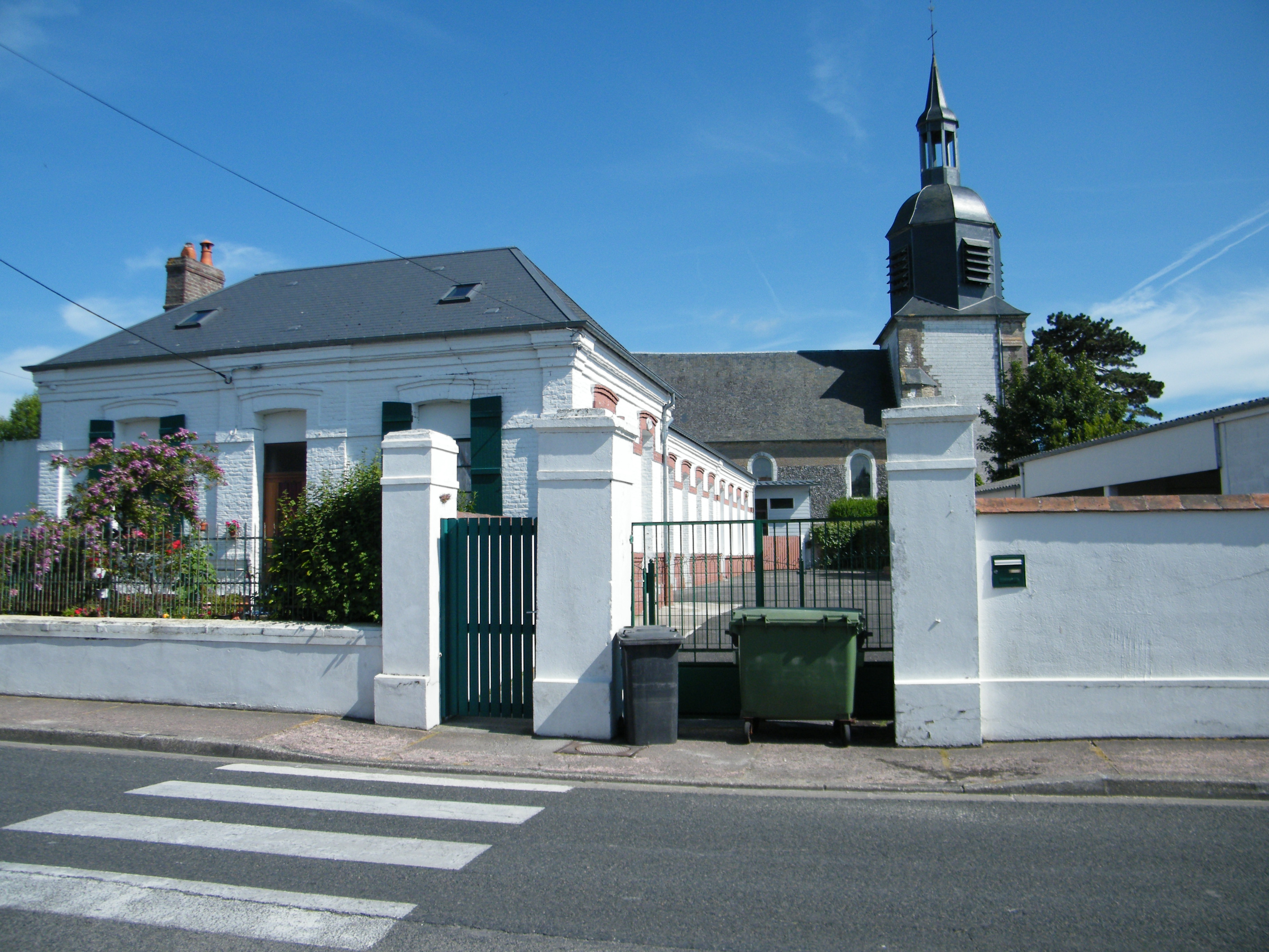 Quend-école.